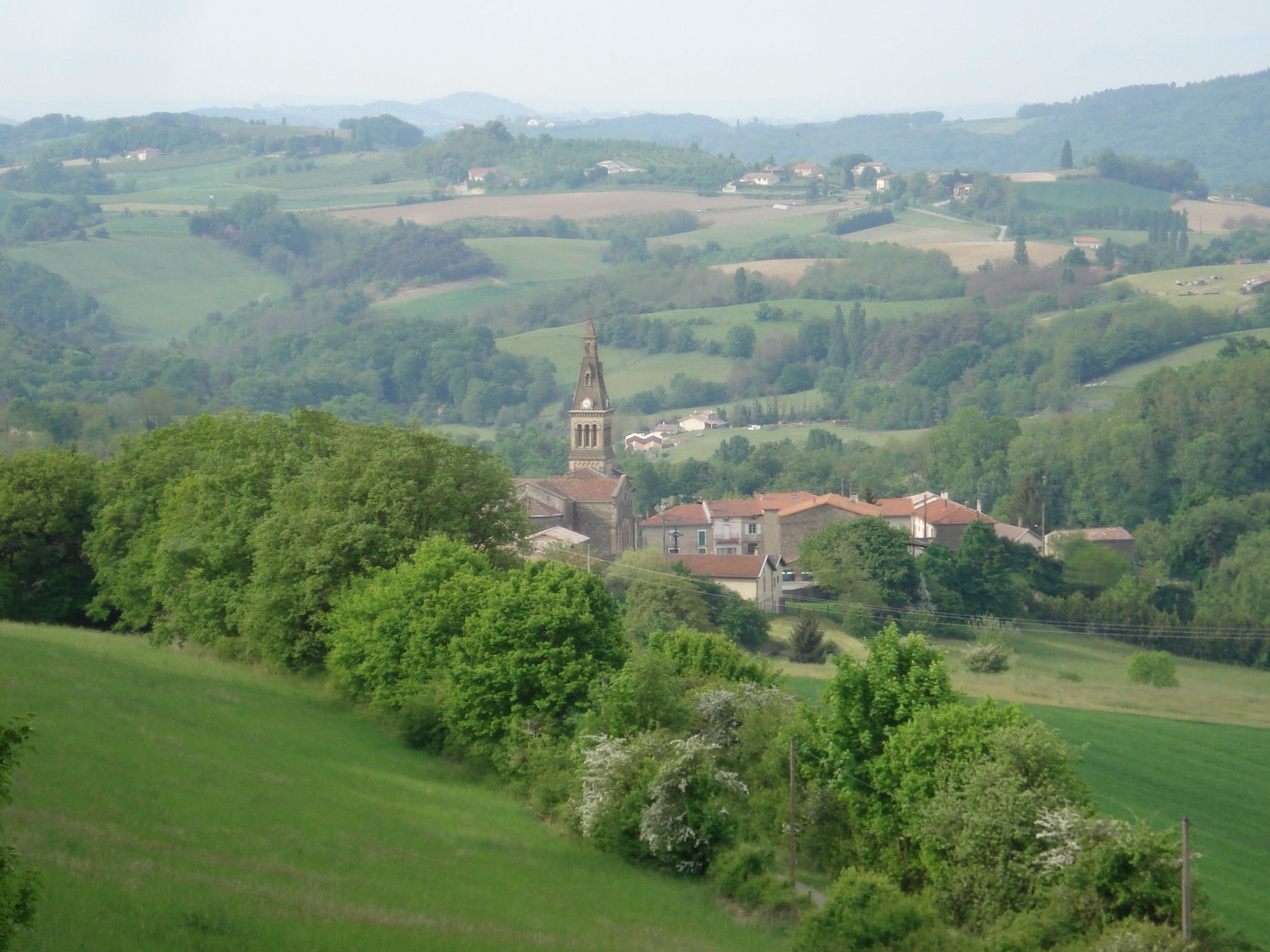 village de Montchenu dans la Drôme